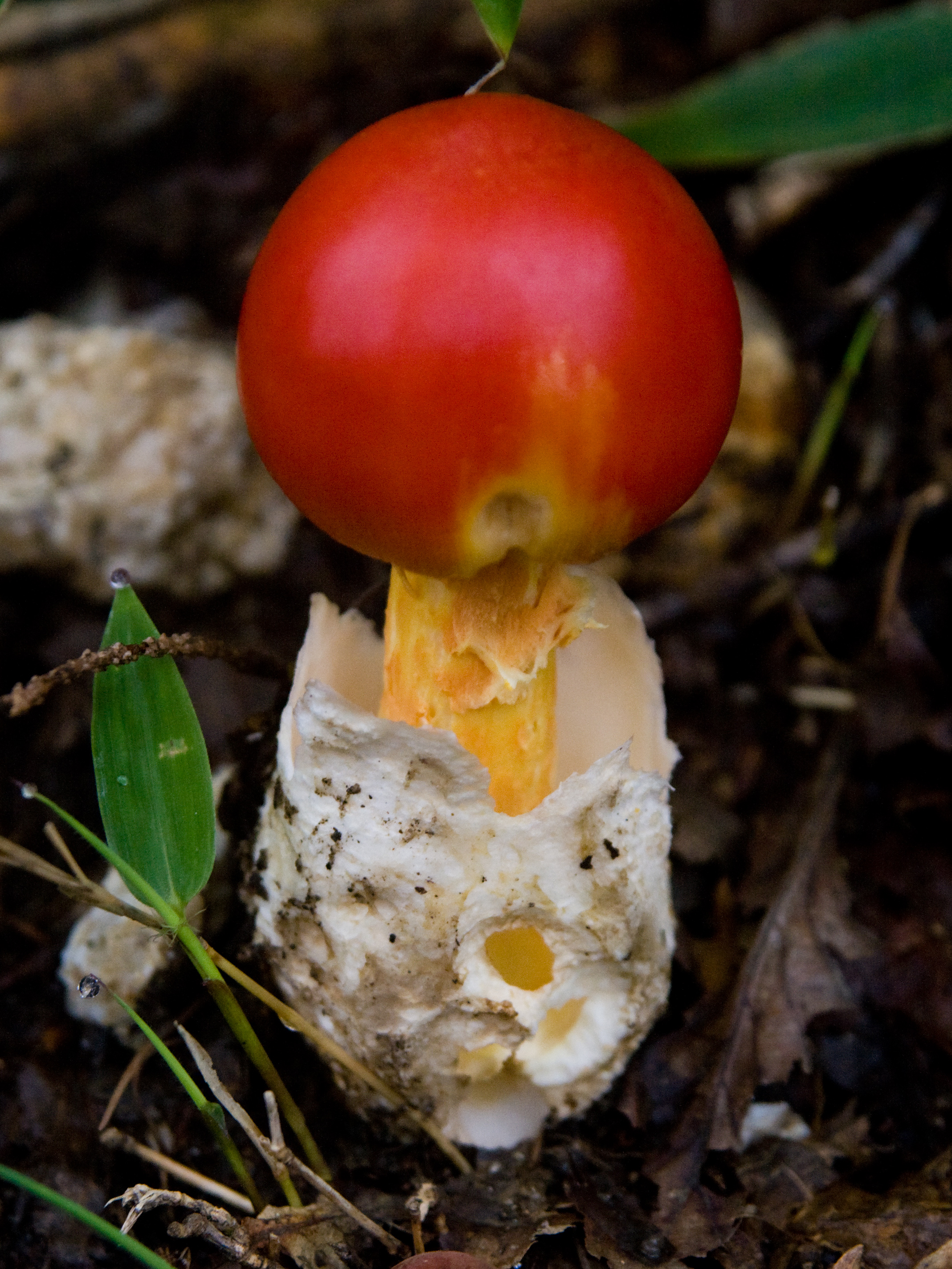 タマゴタケ (学名:Amanita hemibapha)